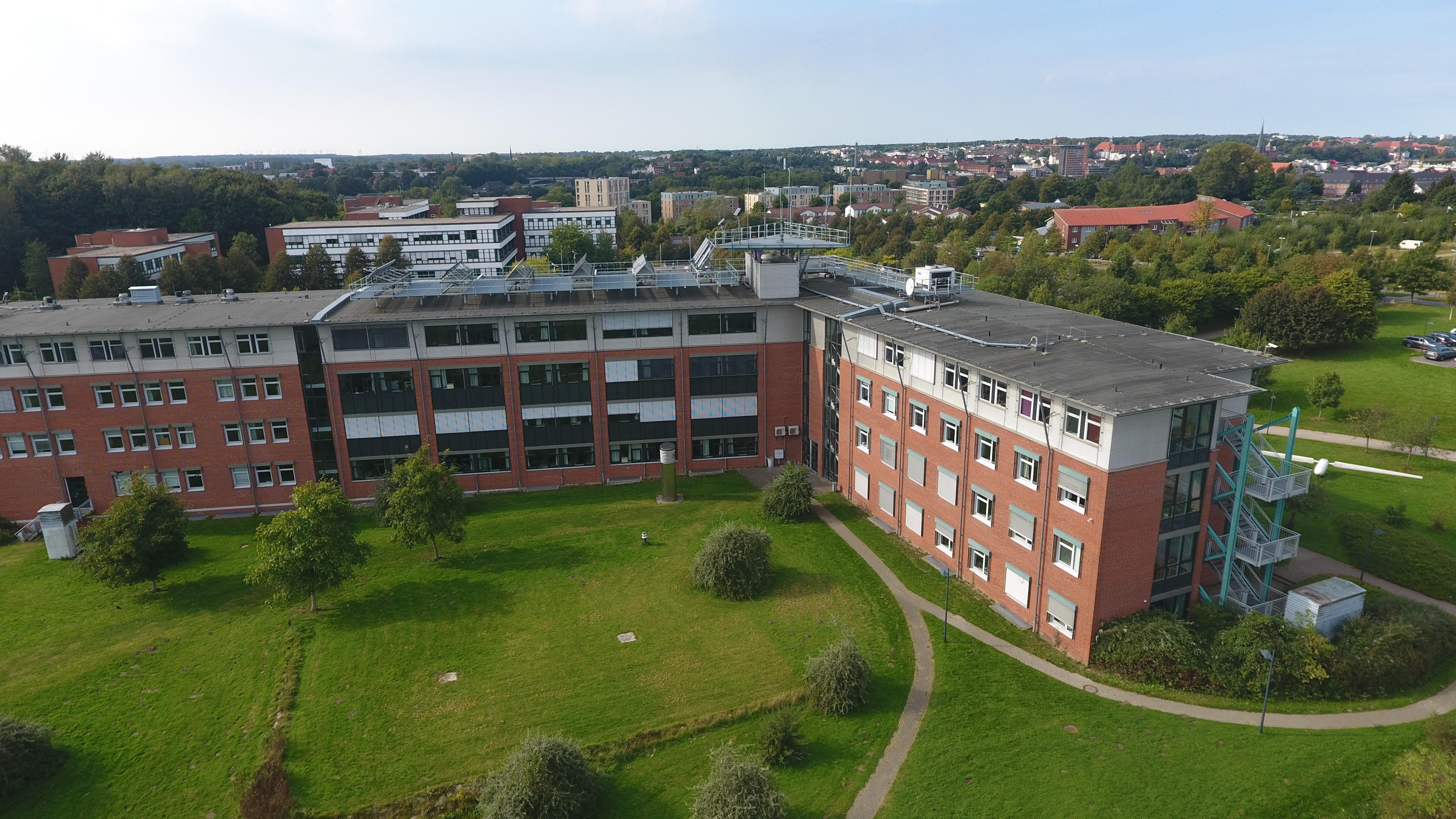 Blick auf das D-Gebäude der Hochschule Flensburg.